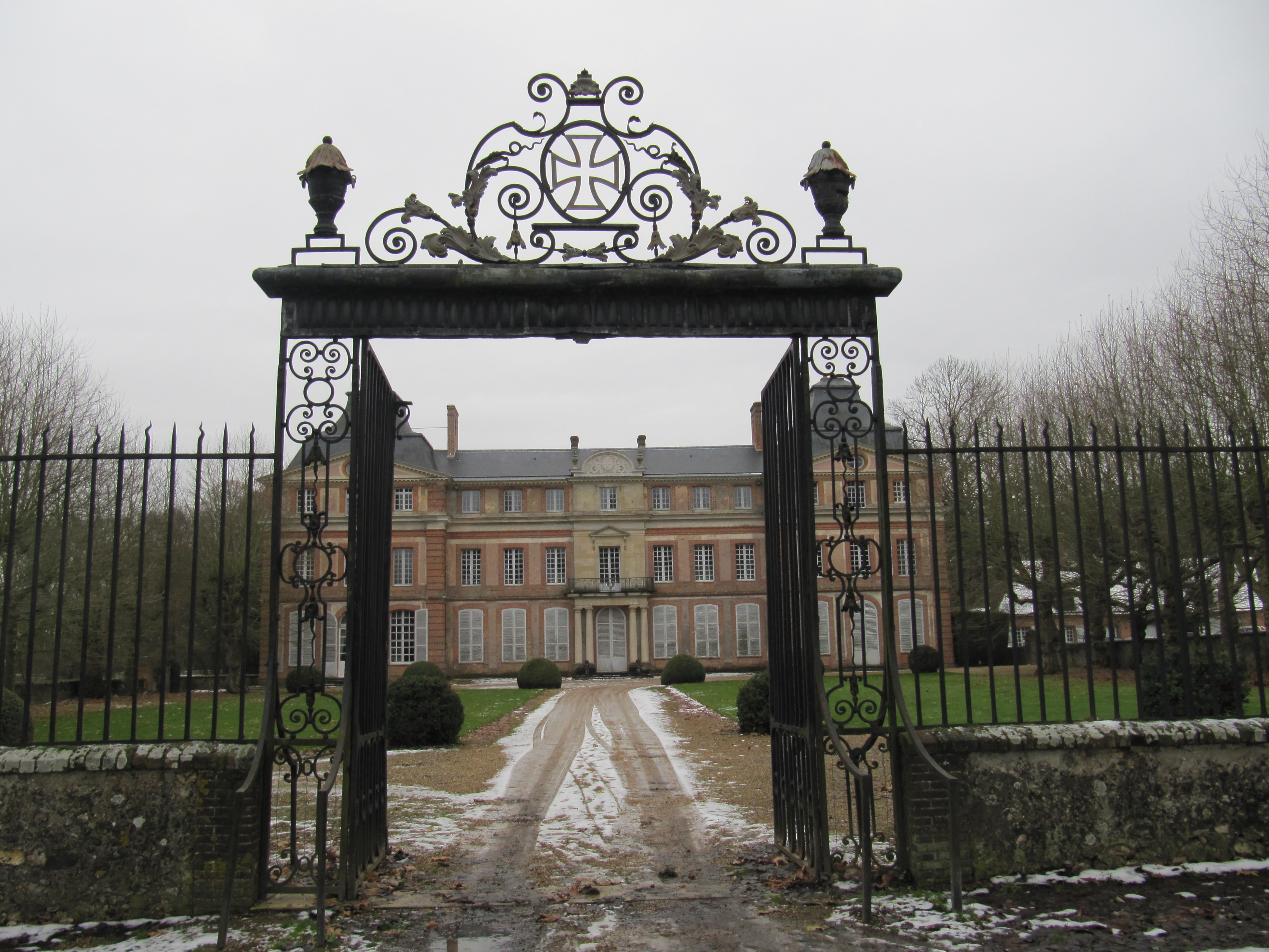 La grille du château date de la construction du château ( vers 1785) Un ajout a été fait sous la restauration: le blason de la famille du Tillet.